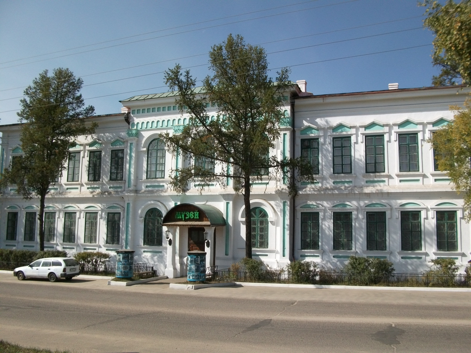 Здание краеведческого музея (Республика Бурятия, Кяхта, улица Ленина, 57)